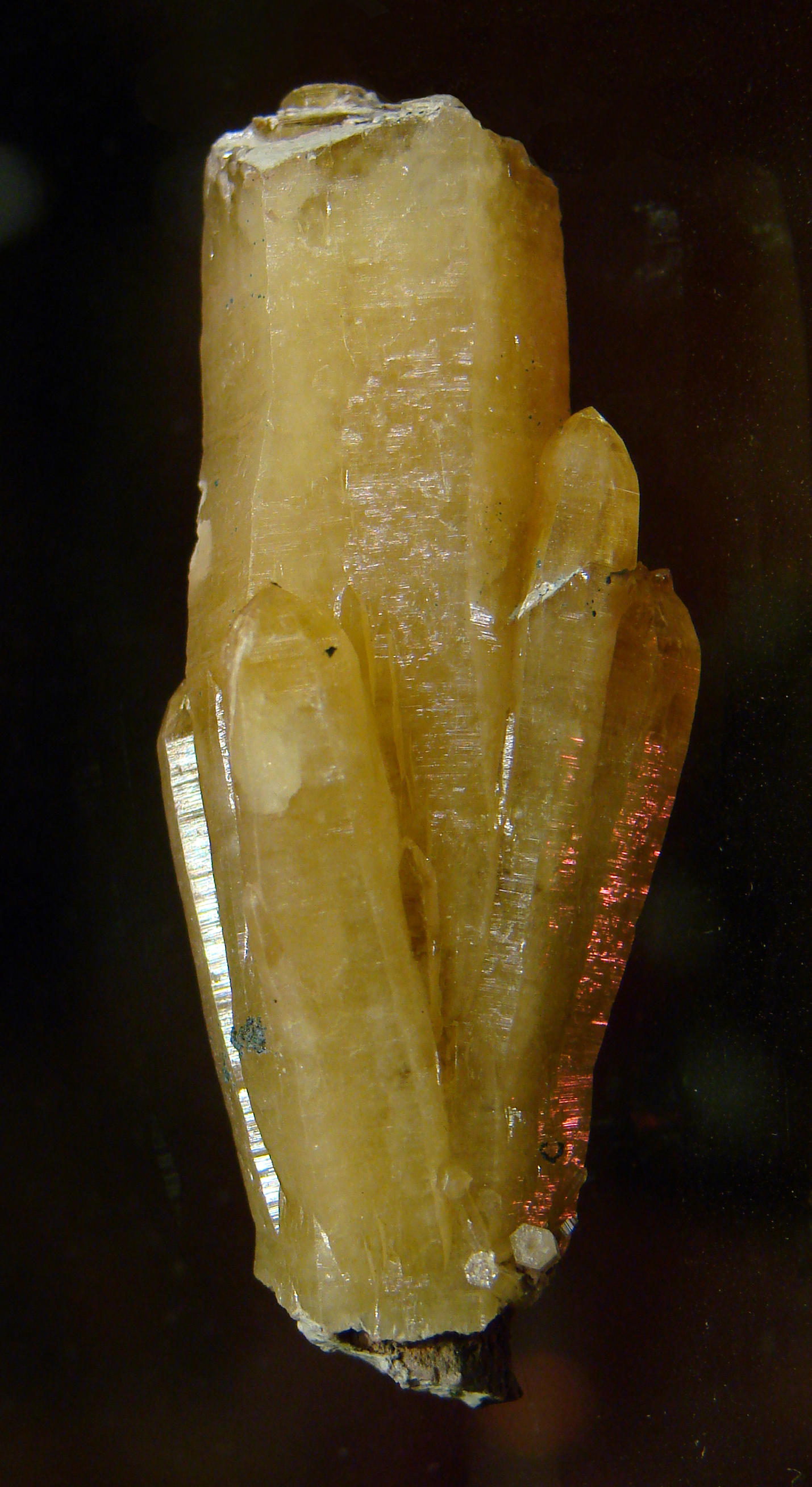 Mimétite. Provenance: Tsumeb, Namibie.